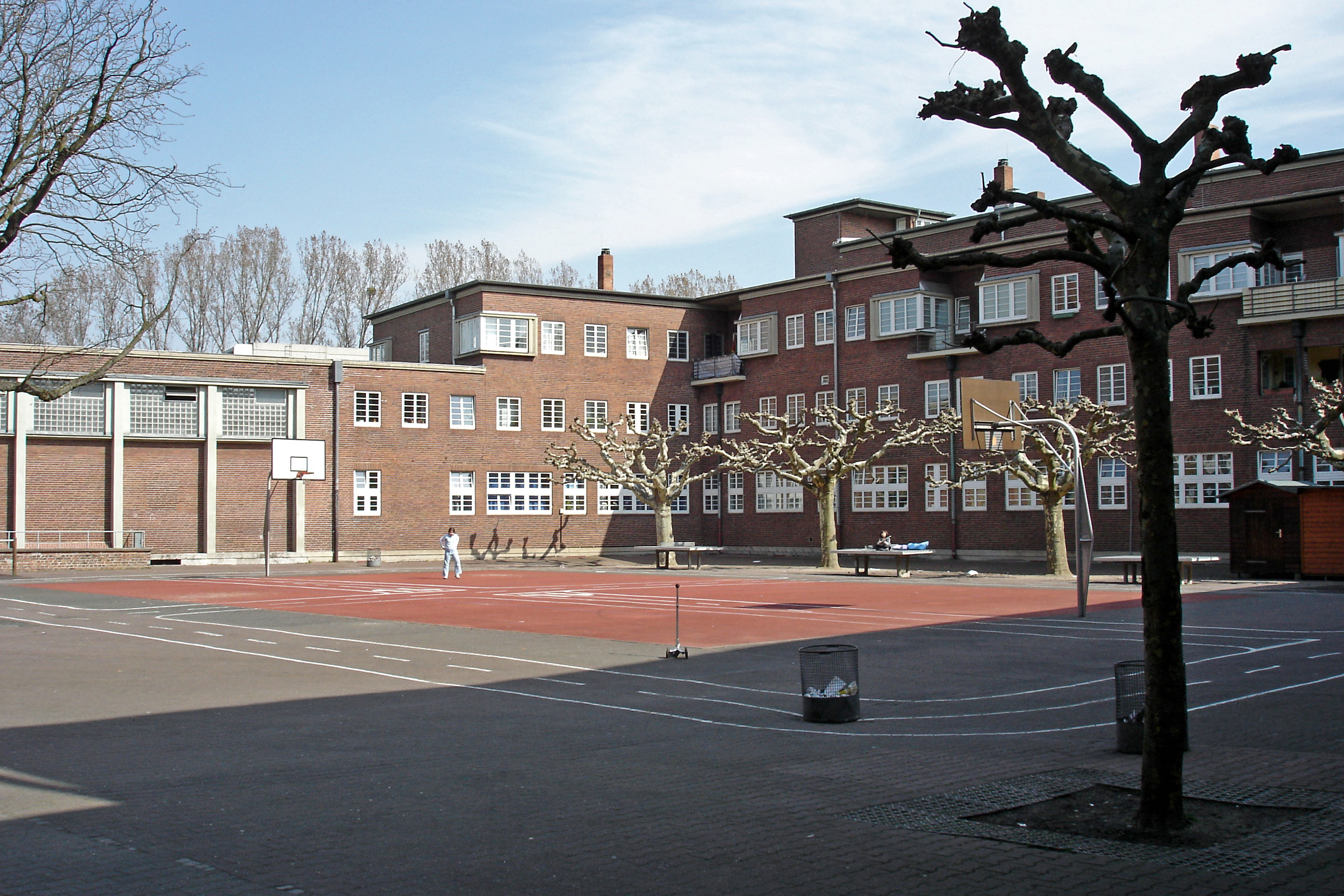 Pestalozzischule (auf Seckbacher Gebiet), Grundschule für Riederwald (Schulhof)